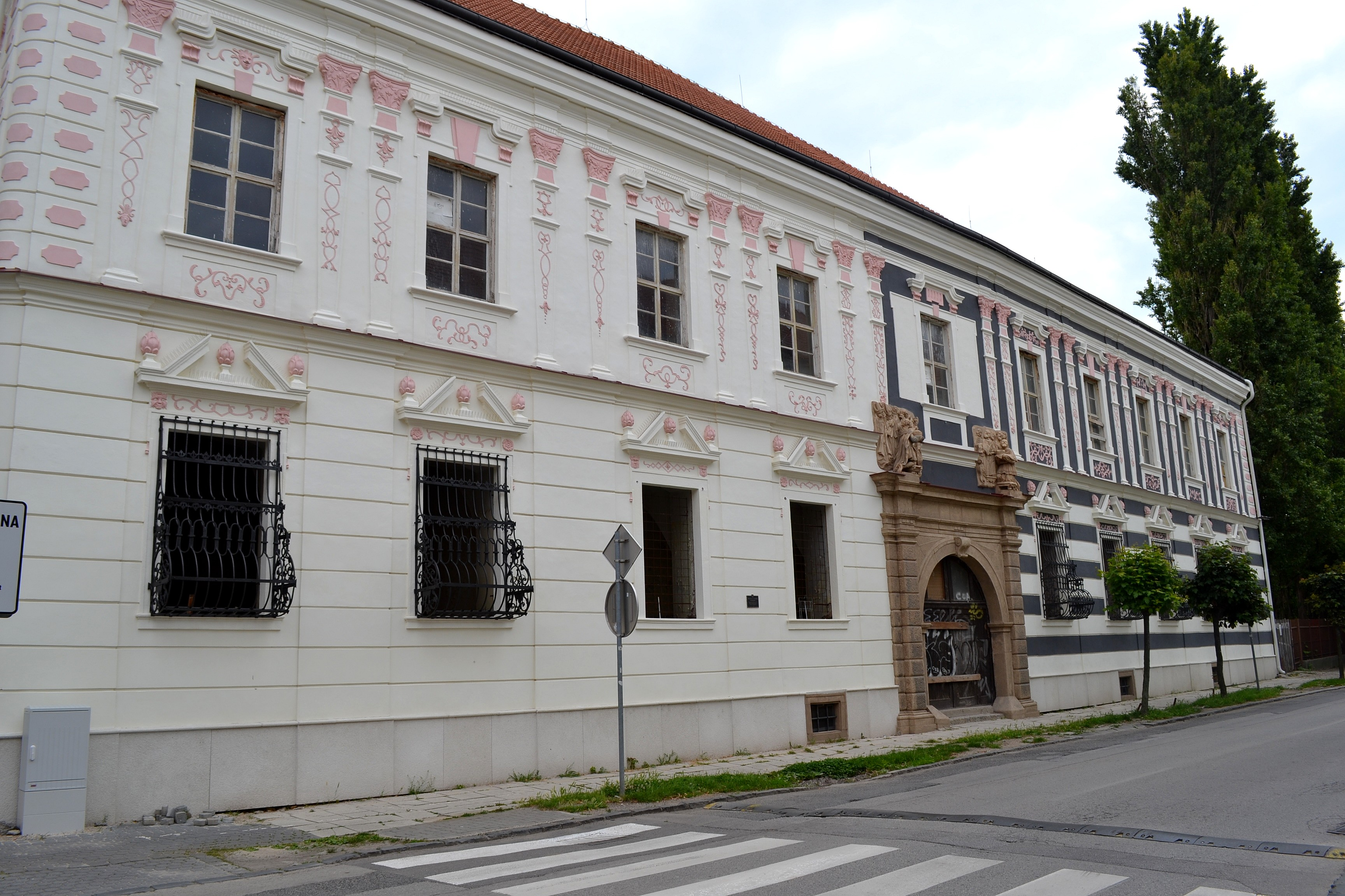 Trnava, komplex univerzitných budov; budova Seminára svätého Štefana (Stephaneum); celkový pohľad